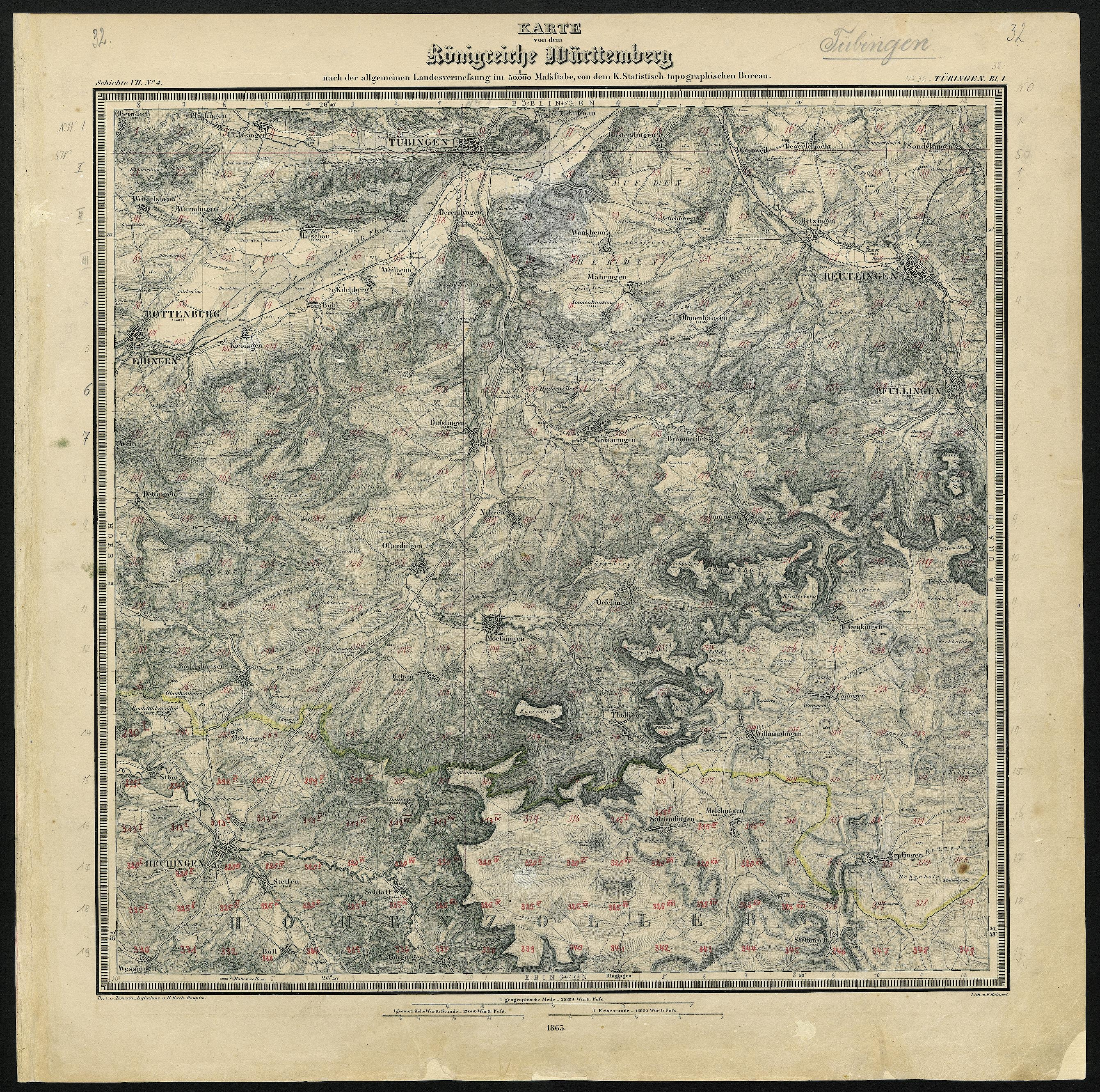 Topographischer Atlas des Koenigreichs Württemberg. Maßstab 1:50.000. Blatt 32, Tübingen. Übersicht der Einzelblätter → hier.